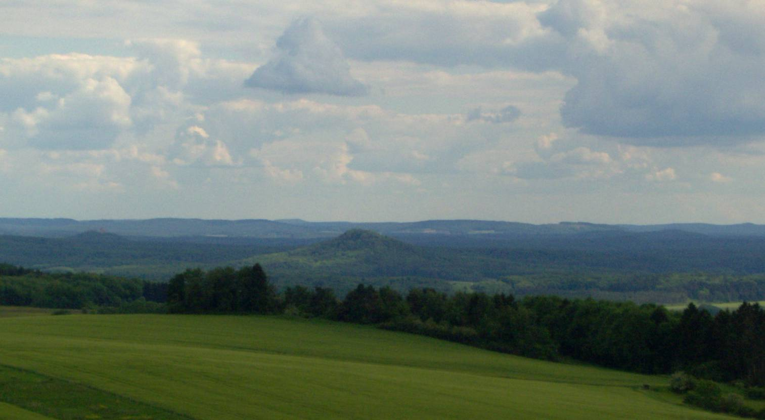 Straufhain (449 m) mit Burgruine vom Hildburghausener Stadtberg aus; links hinten die Veste Heldburg (403 m), im Hintergrund die Haßberge